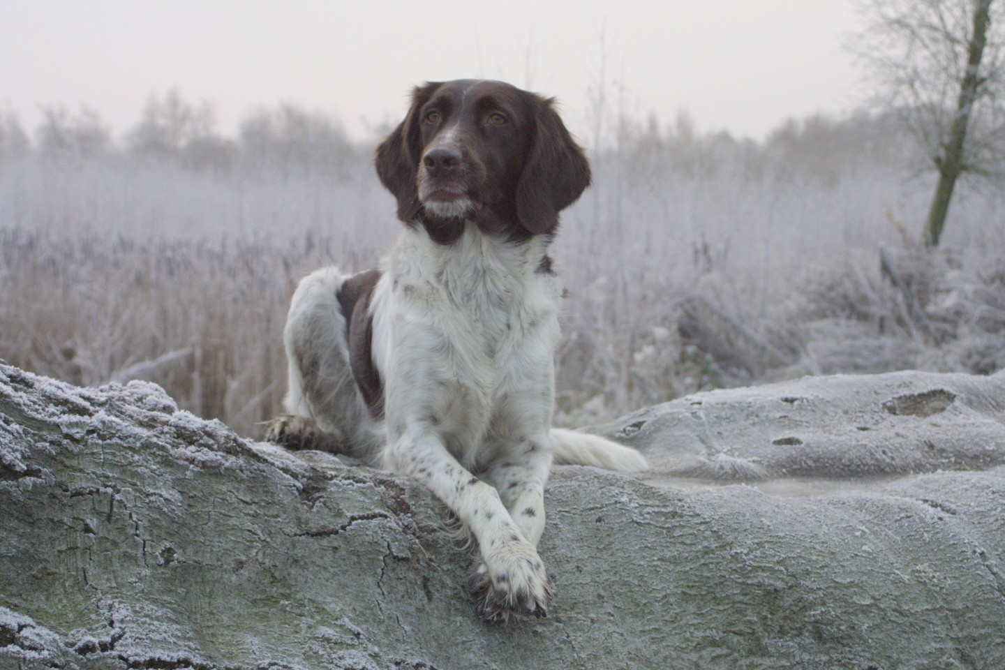 Kleiner Münsterländer